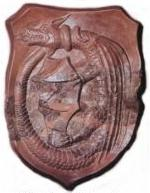 Der fein bearbeitete Marmorstein zeigt einen Wappenschild haltende, schuppige mit Flügel versehenen Drachenschlange.